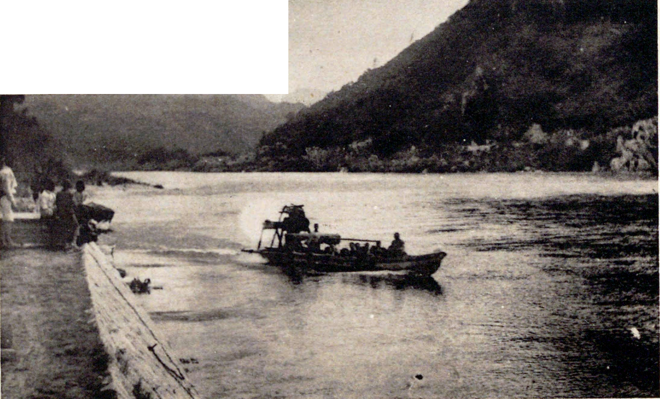 大正時代から昭和初期にかけて江の川で運行していた江川飛行船